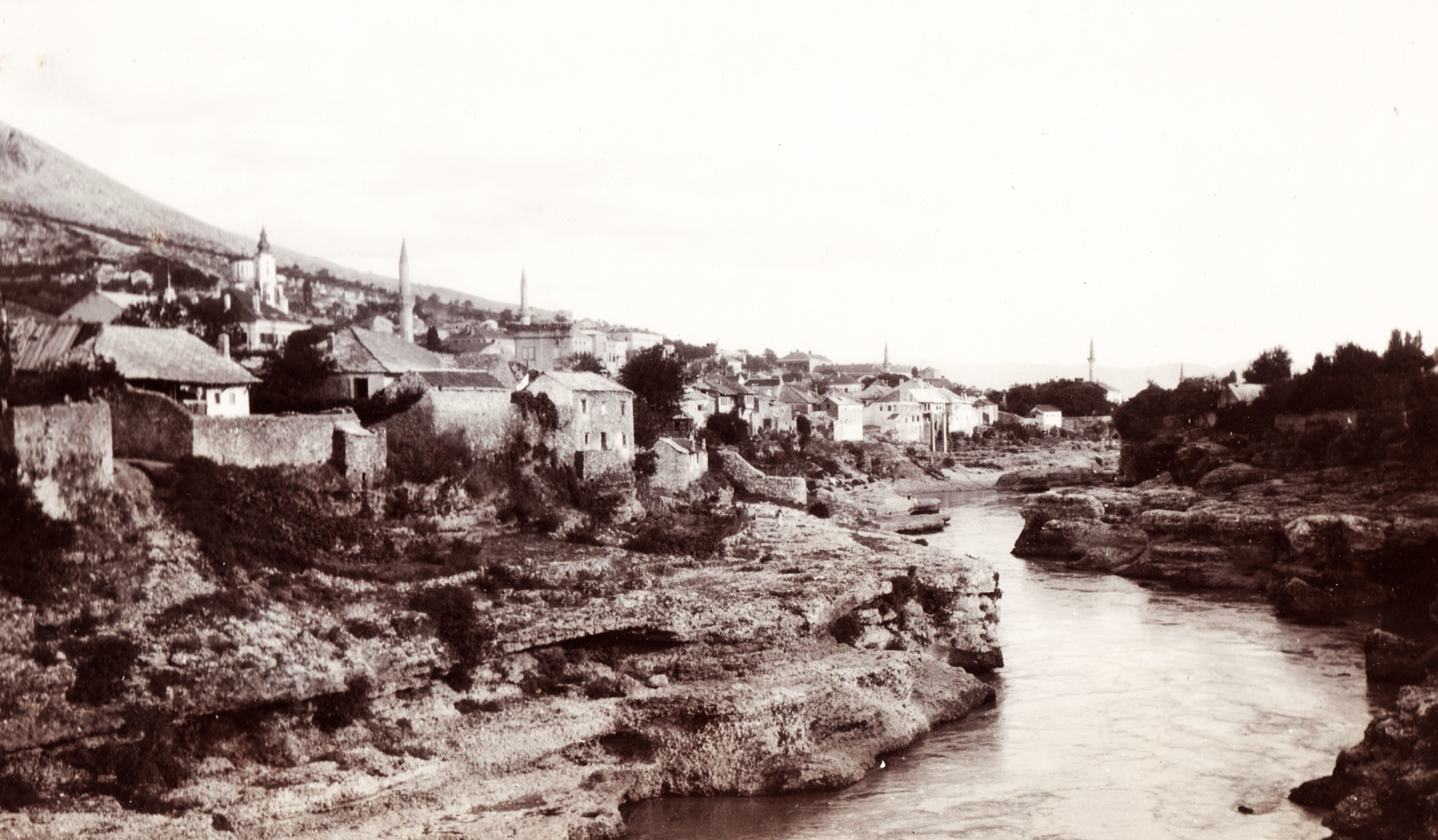 a város látképe. Location: Bosnia and Herzegovina Tags: river, shore, picture, water surface Title: a város látképe.